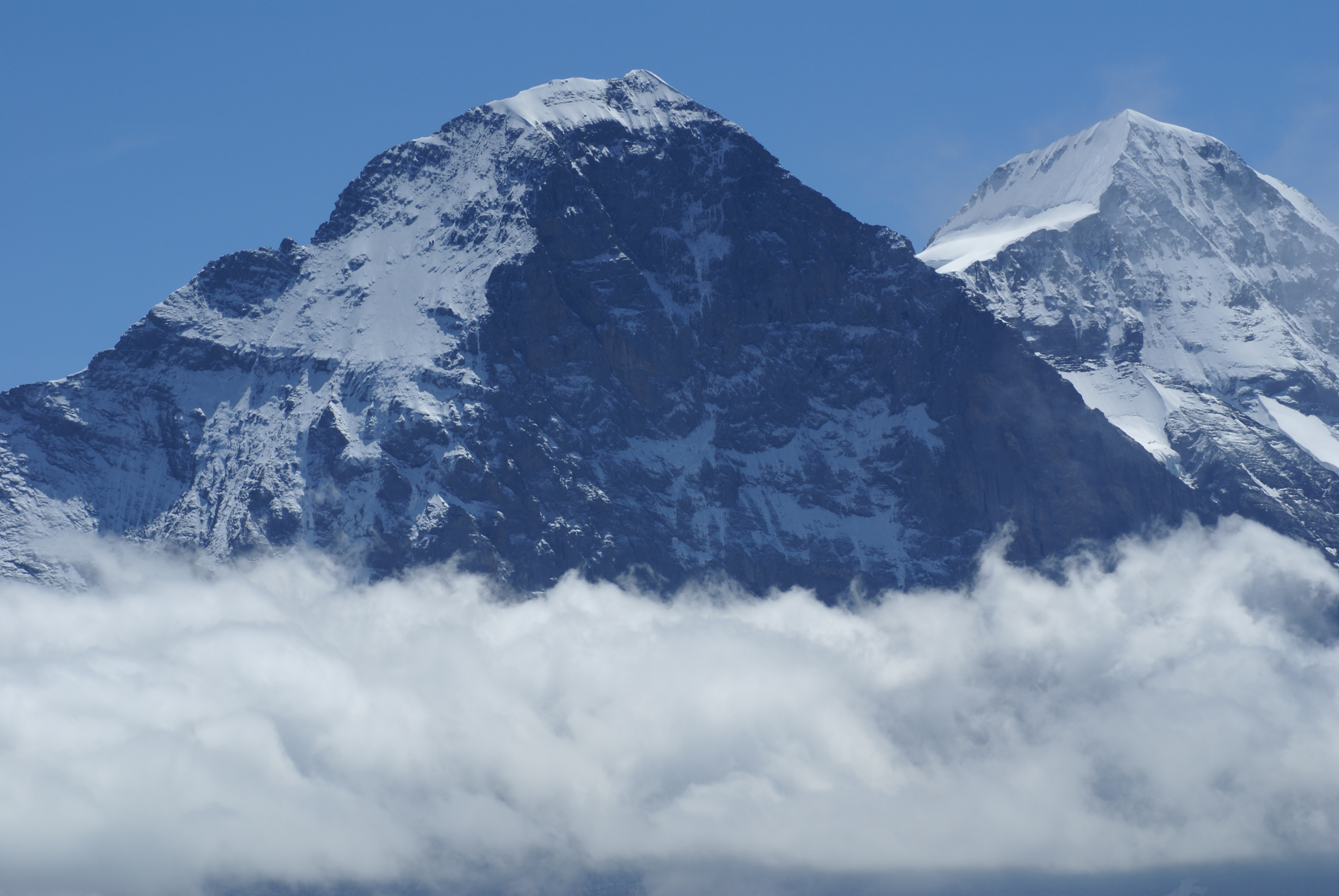 Eigernordwand. Im Hintergrund: Mönch